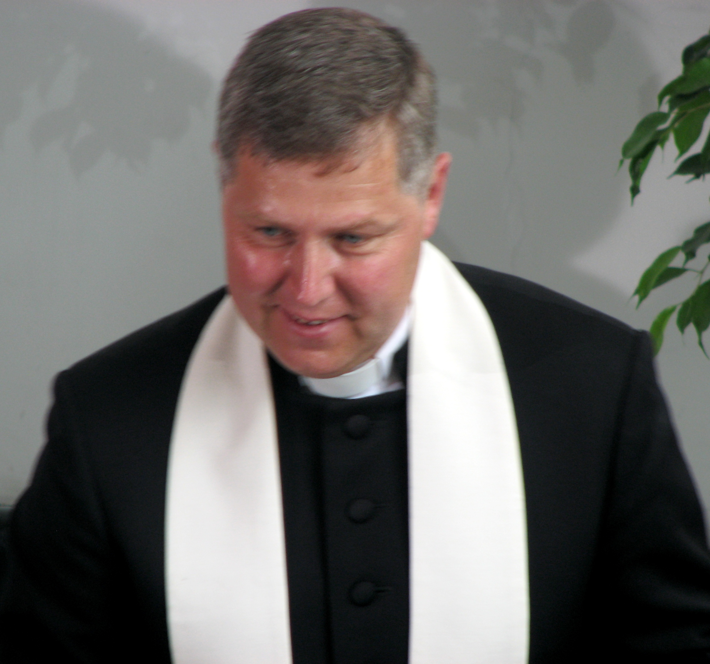 Viljar Liht nelipüha oikumeenilisel jumalateenistusel Harkujärve Stefanose Kirikus